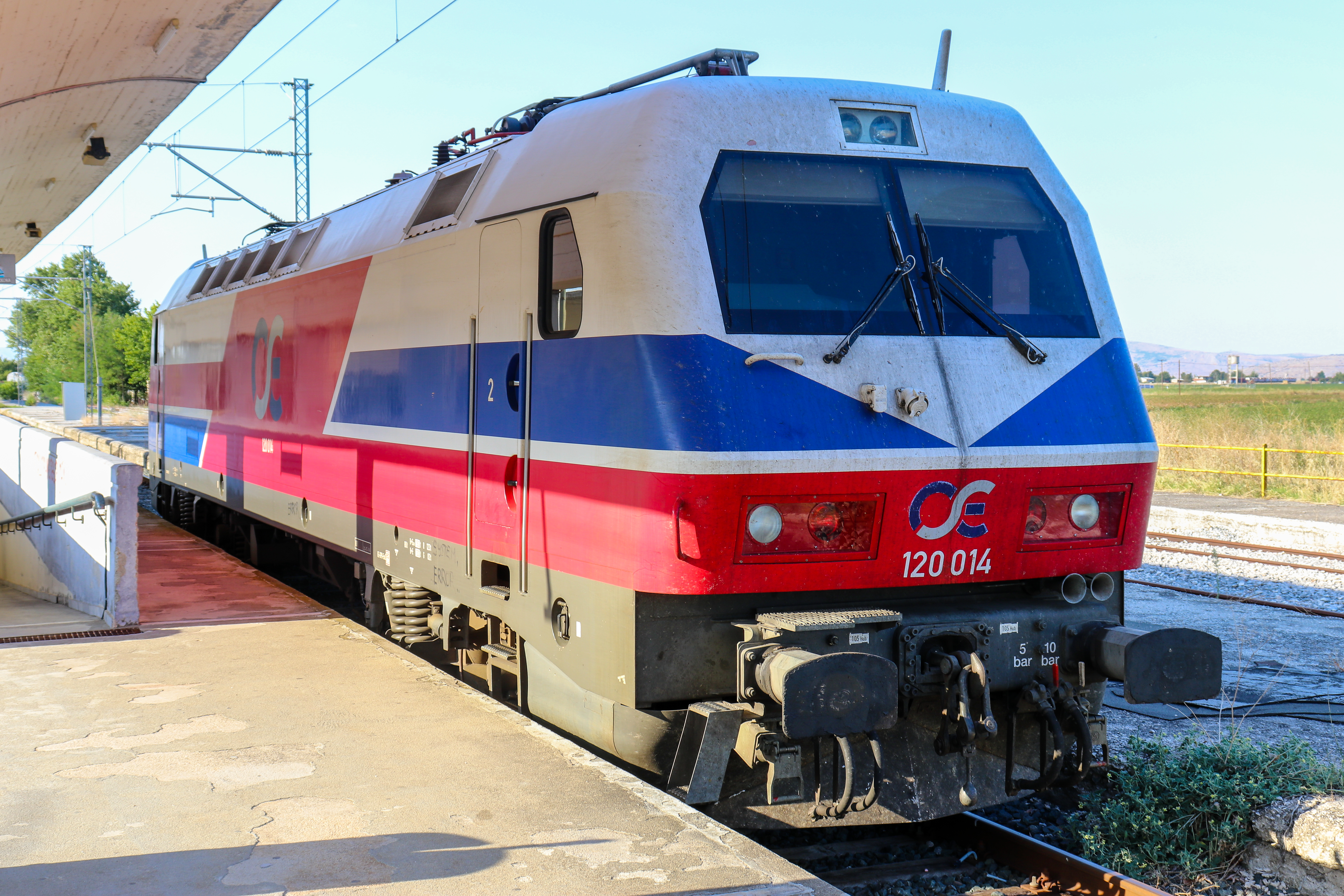 Железнодорожная станция "Палеофарсалос". OSE 120 014